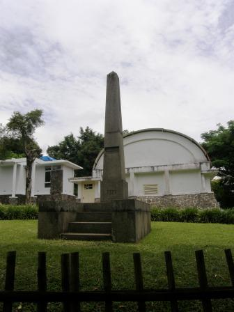 Bosscha-Denkmal in Lembang